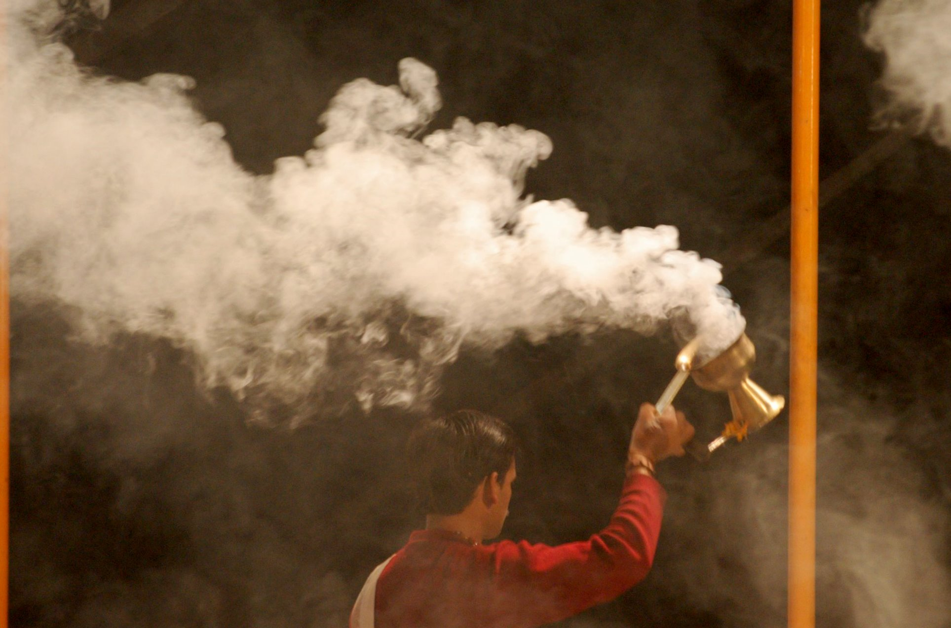 Incense smoke Aarti, Ganges, Varanasi.